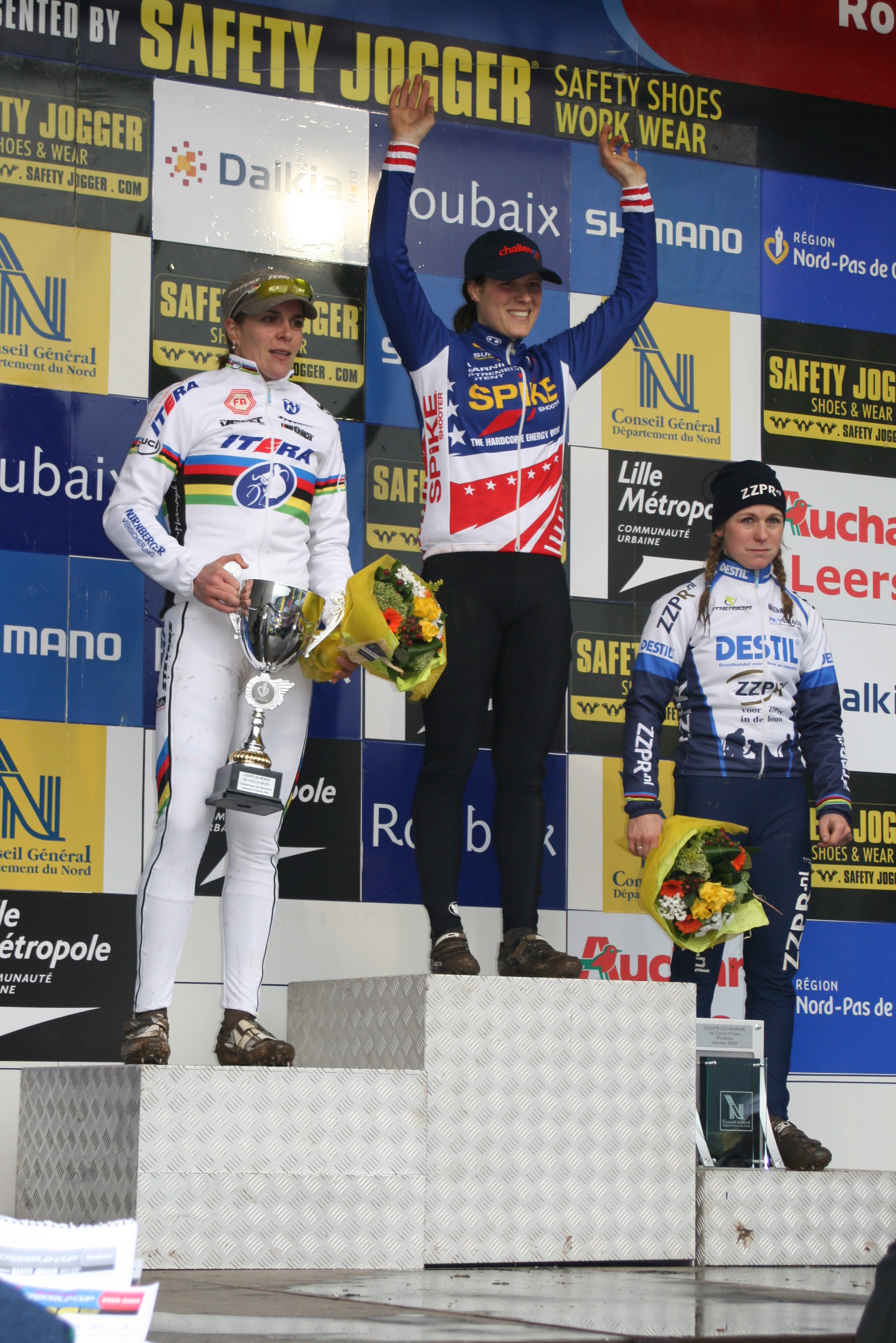 Podium du cyclo-cross de Roubaix 2009 (Hanka Kupfernagel, Katie Compton, Daphny van den Brand)